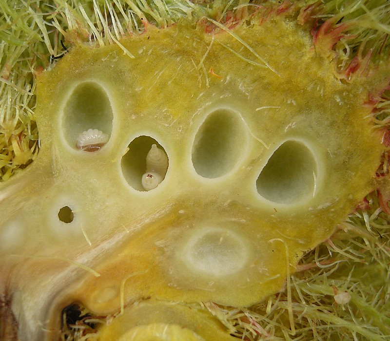 Diplolepis rosae on Rosa canina